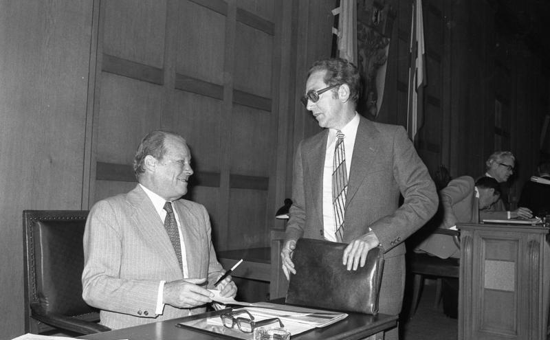 Bundeskanzler Helmut Schmidt in Berlin (West) auf Sitzung des SPD-Vorstandes und des SPD-Parteirats im Rathaus Schöneberg (links: Willy Brandt, rechts: Erhard Eppler)